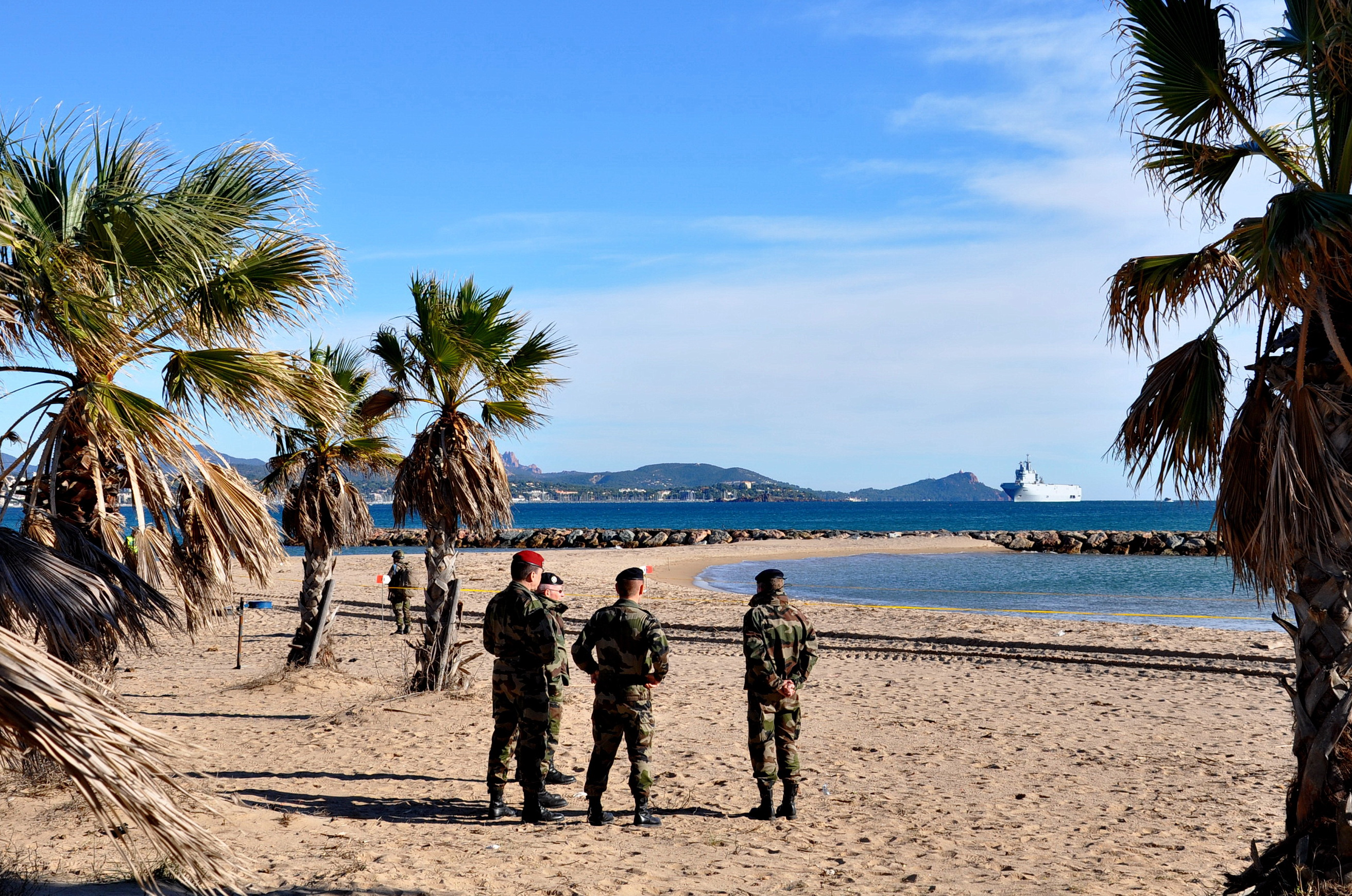 Fréjus-plage occupée